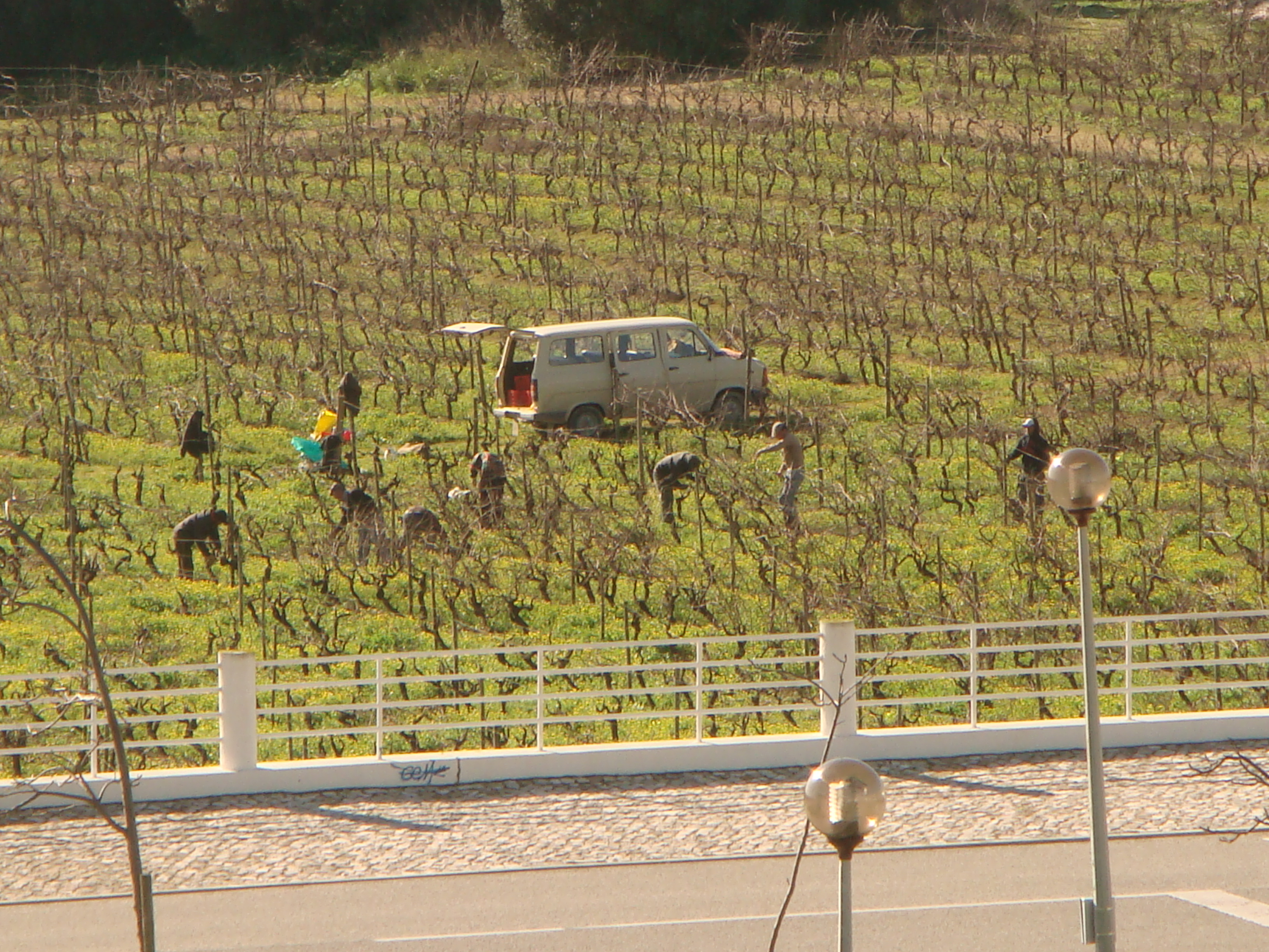 Vinhas em Carcavelos